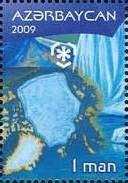 Qütb zonalarının və buzlagların qorunması